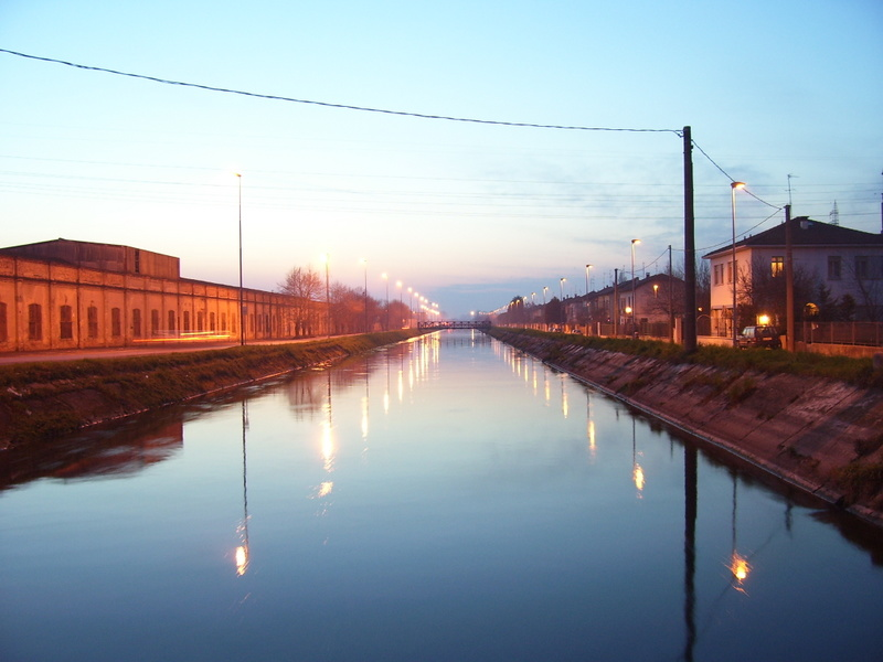 vista delle Villette di Crema (destra) e della Ferriera (sinistra) ora in disuso